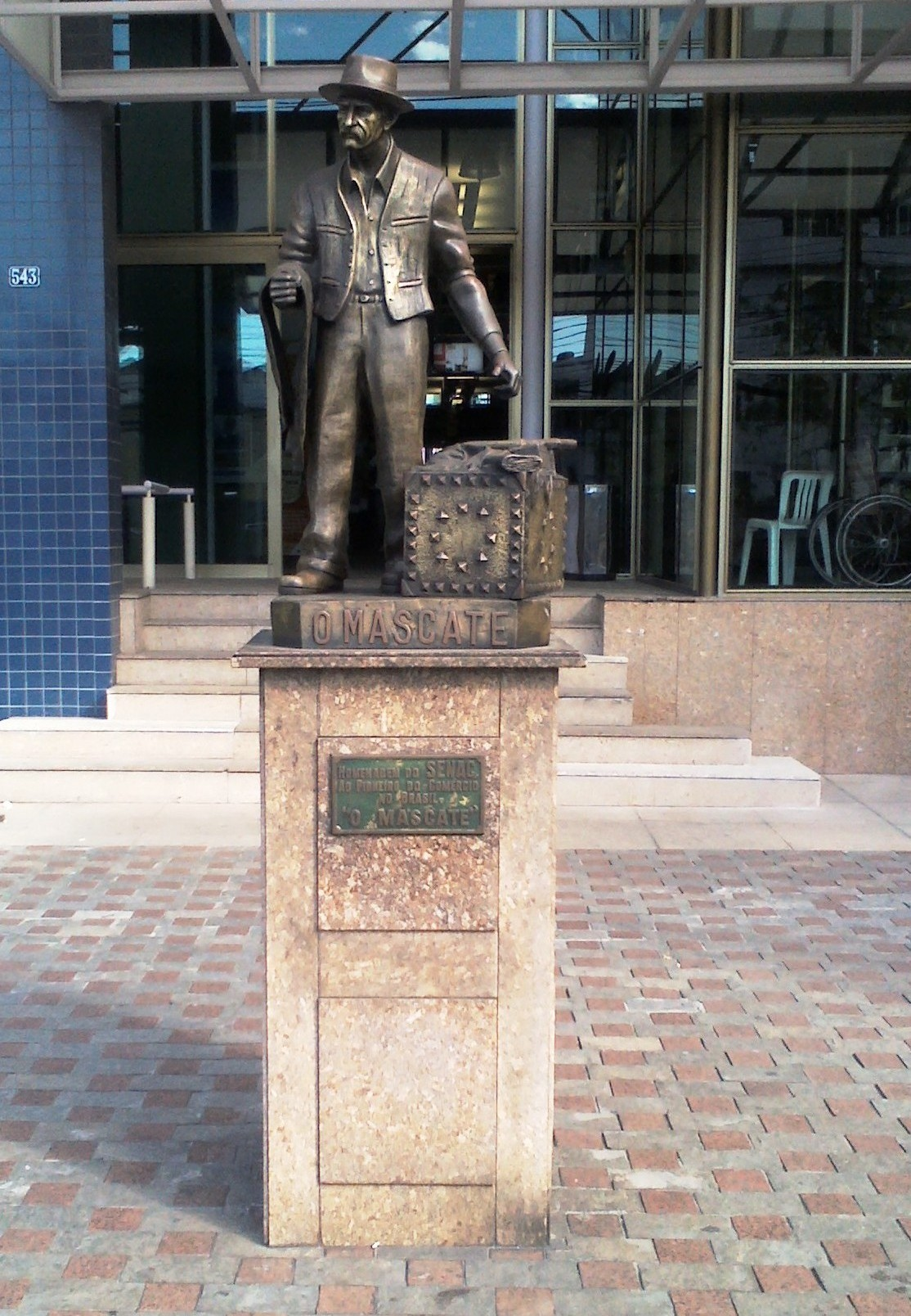 "Homenagem do SENAC ao pioneiro do comércio no Brasil - O Mascate". Bronze, SENAC Centro Politécnico, Riachuelo, Rio de Janeiro, RJ, Brasil. Reprodução de original de Honório Peçanha (1964).